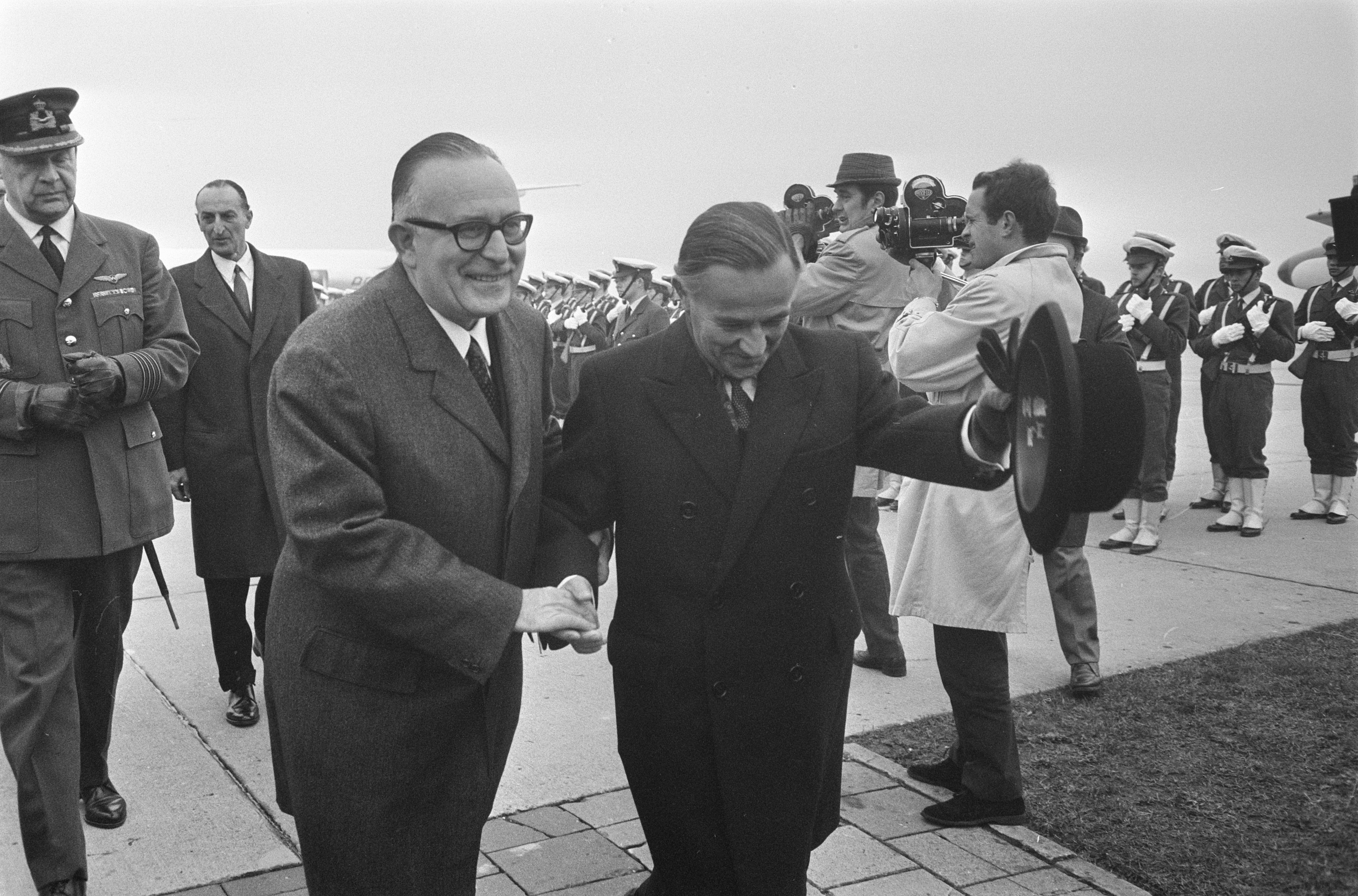 Collectie / Archief : Fotocollectie Anefo Reportage / Serie : [ onbekend ] Beschrijving : Aankomst Bondskanselier Willy Brandt van Duitsland op Ypenburg. Aankomst premier Rumor van Italie, links Rumo en rechts minister de Jong Datum : 1 december 1969 Trefwoorden : aankomsten Persoonsnaam : Bondskanselier Willy Brandt Fotograaf : Koch, Eric / Anefo Auteursrechthebbende : Nationaal Archief Materiaalsoort : Negatief (zwart/wit) Nummer archiefinventaris : bekijk toegang 2.24.01.05 Bestanddeelnummer : 923-0334